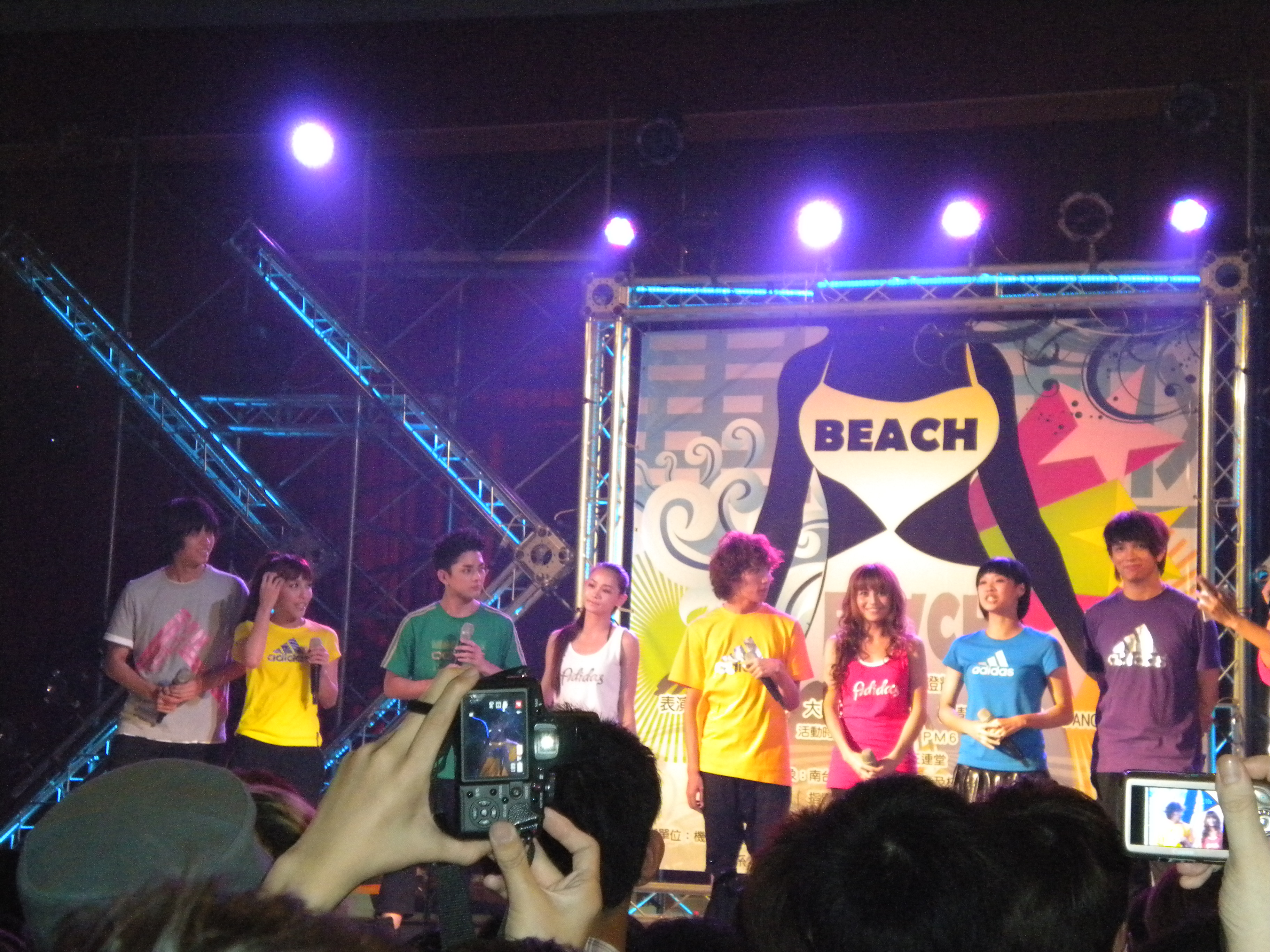 台灣舞蹈團體Dance Flow